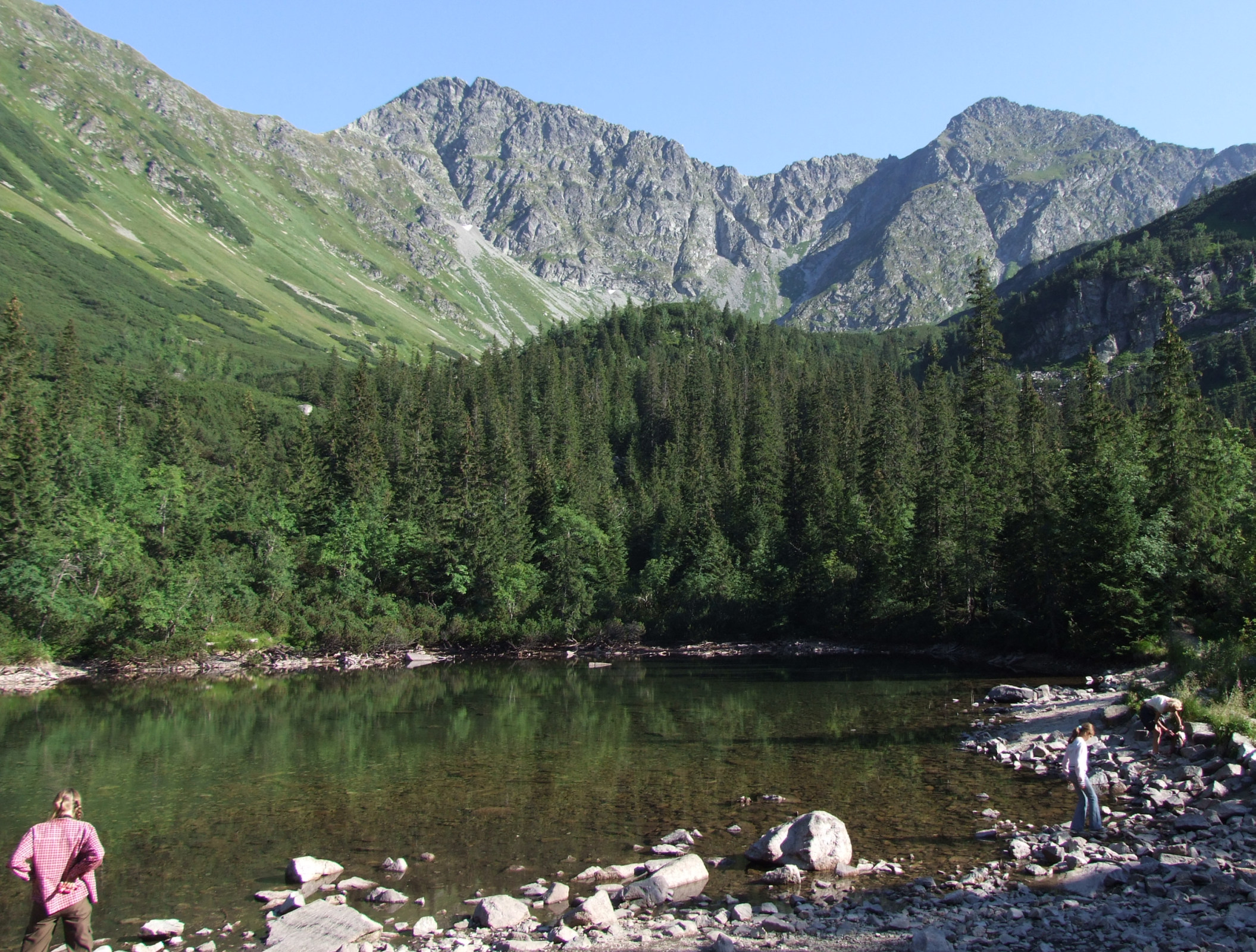 Czarna Młaka (Rohacka Dolina, West Tatra Mountains)